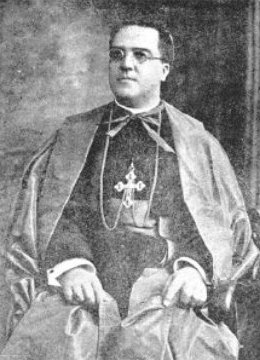 Retrato de Enrique Pérez Serantes